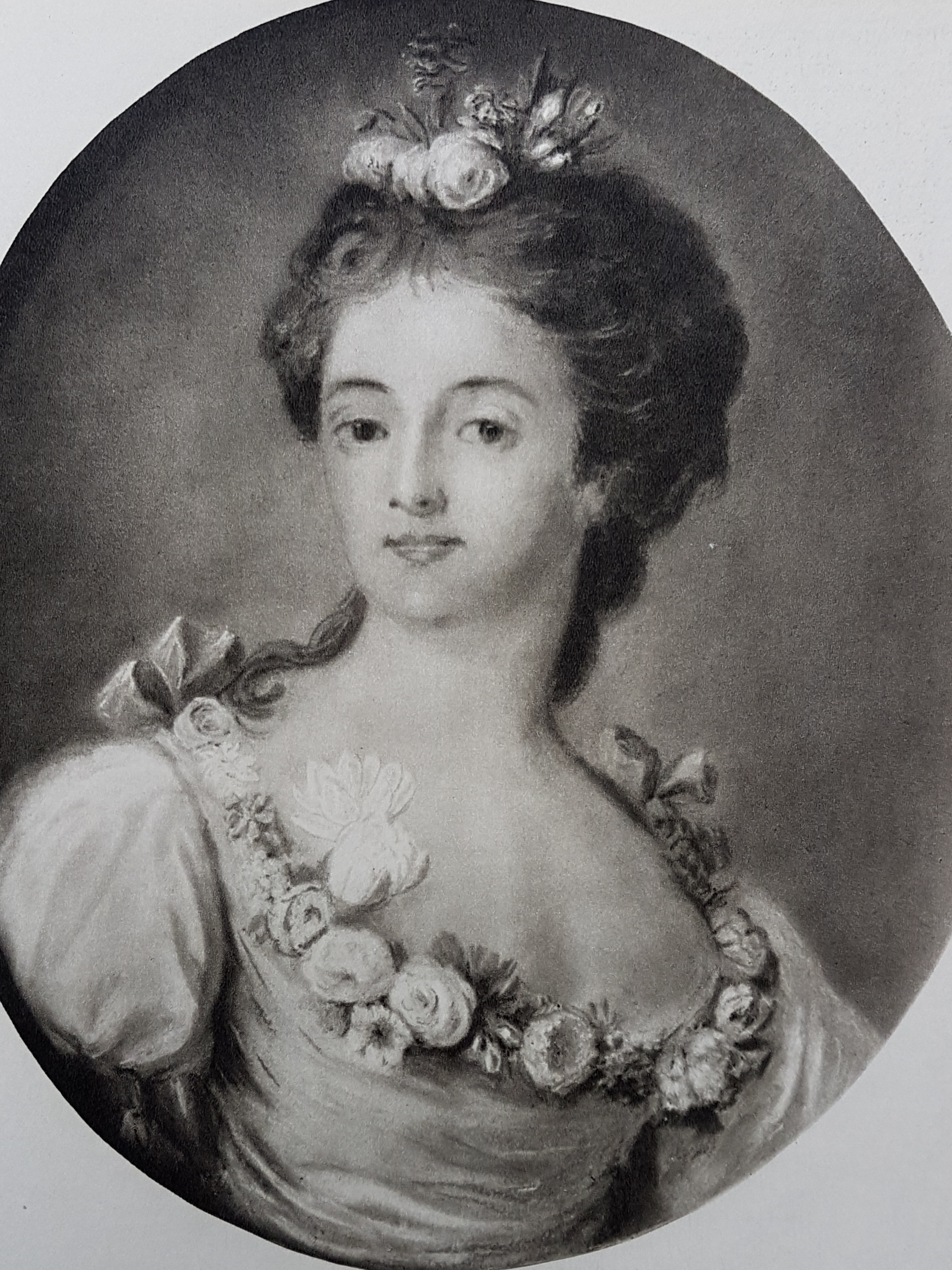 Sophie Hagman porträtterad av Johan von Rosenheim, avfotograferad bild från Allhems Svenskt konstnärslexikon.